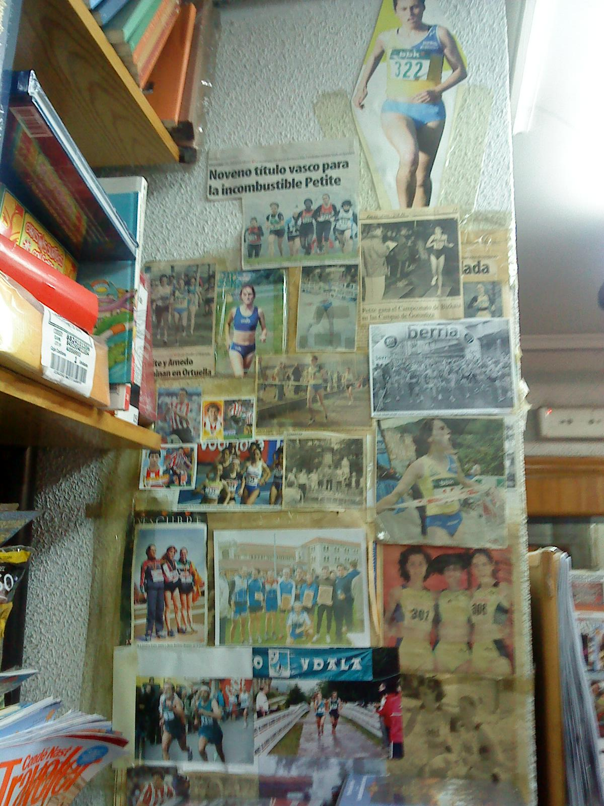 colash con noticias e imagenes sobre Cristina Petite realizado por un acmirador en un establecimiento público.